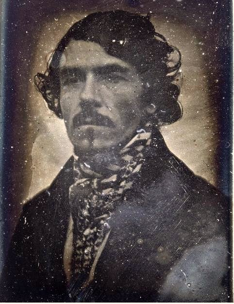 Portrait of Eugène Delacroix(1798-1863)